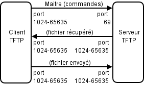 Description : Diagramme des flux de TFTP Author : Liné1 Fait avec DIA